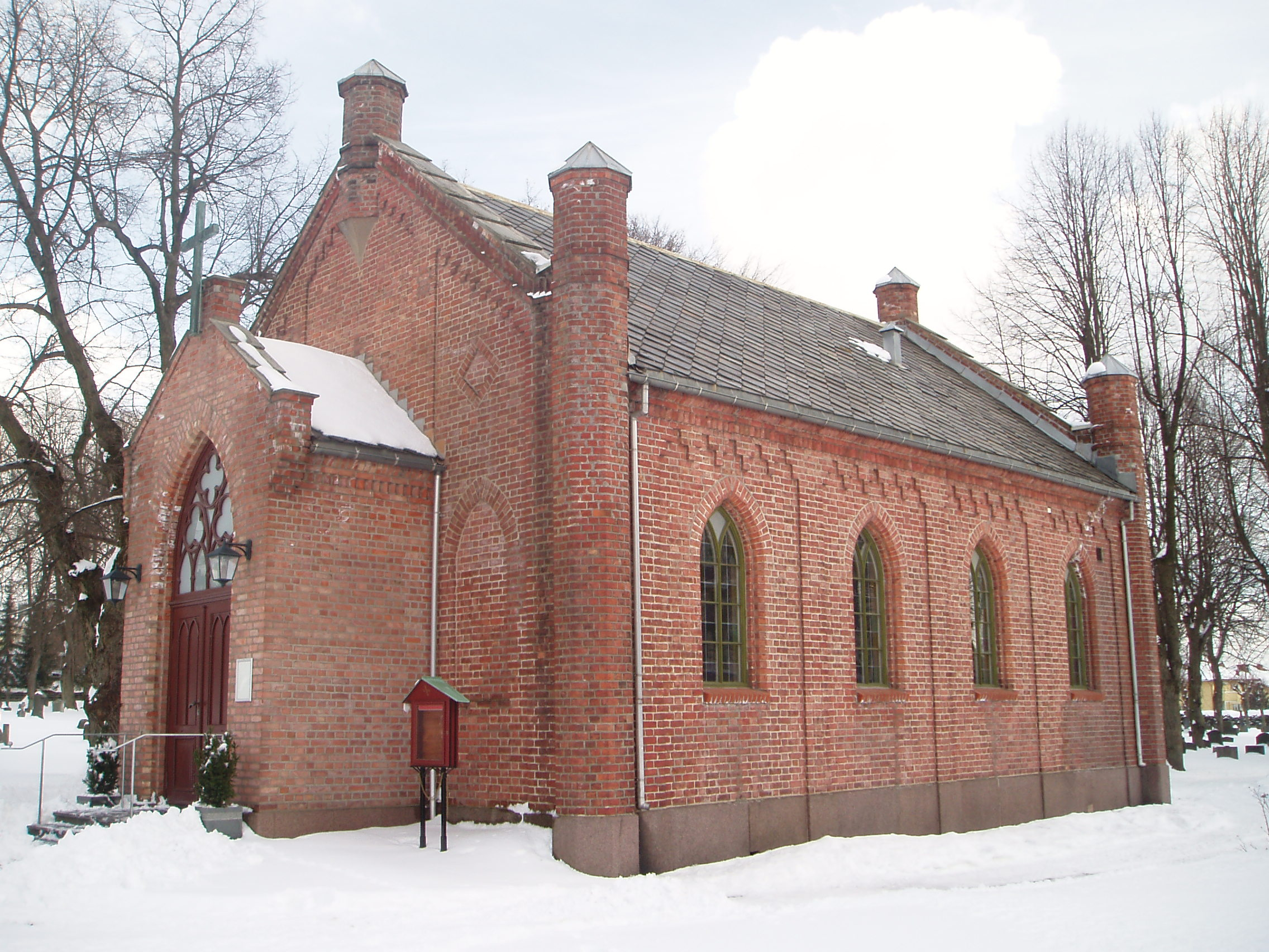 Mariakapellet i Tønsberg. Tidligere gravkapell på Tønsberg gamle kirkegård, nå arena for kulturarrangementer.